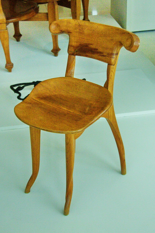 Cadira Batlló d'Antoni Gaudi, 1906. (MNAC)